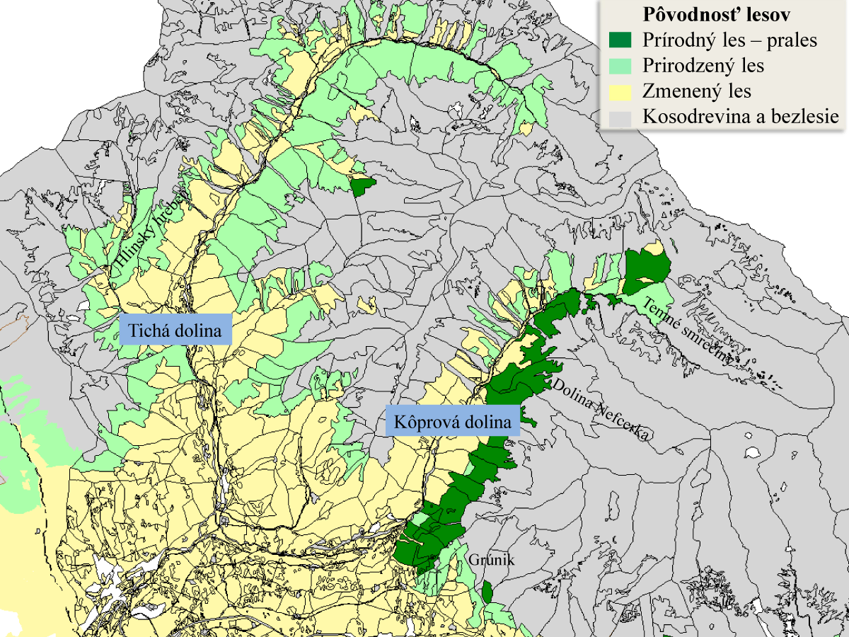 Mapka pôvodu lesov v Tichej a Kôprovej doline vo Vysokých Tatrách